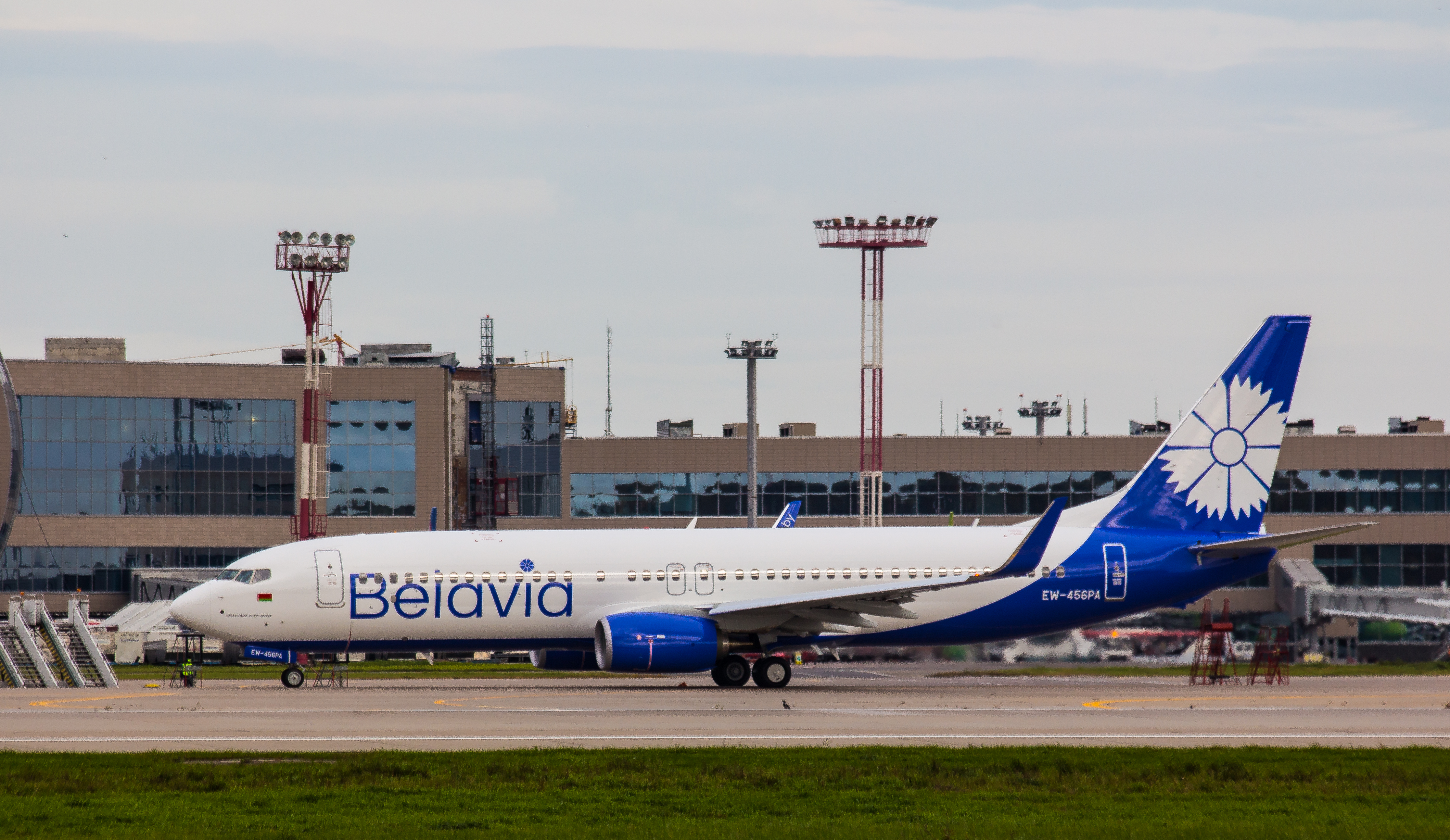 Самолет "Белавиа" в новой ливрее